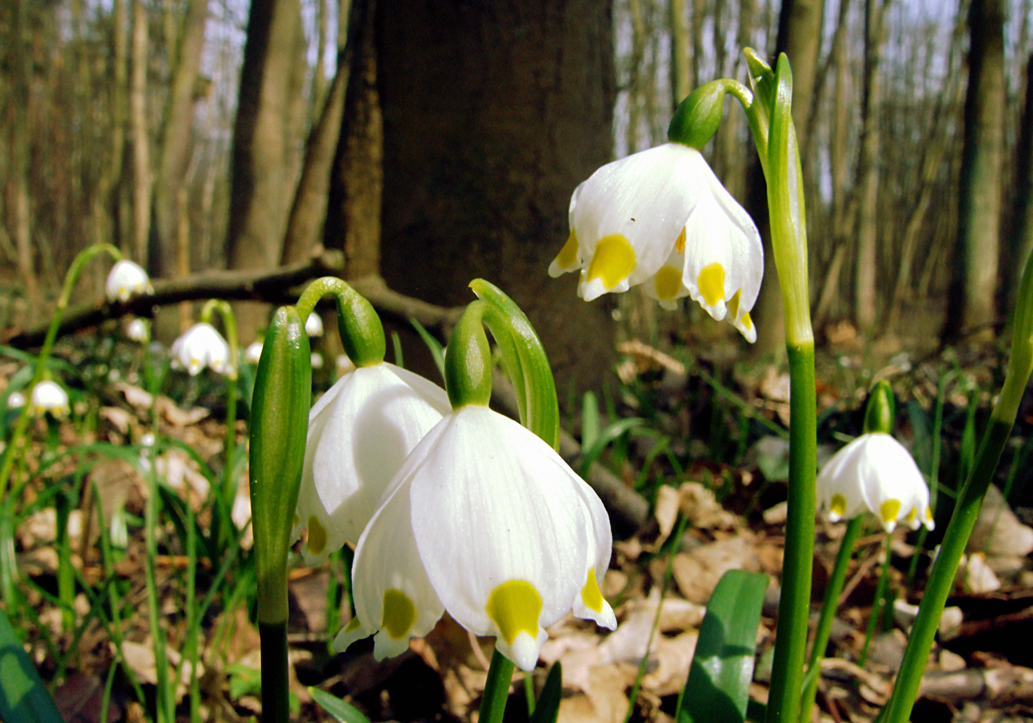 Śnieżyca wiosenna (Leucojum vernum)